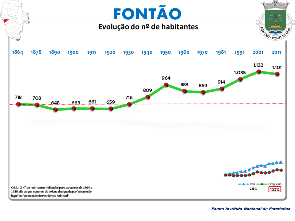 Cenos 1864/2011